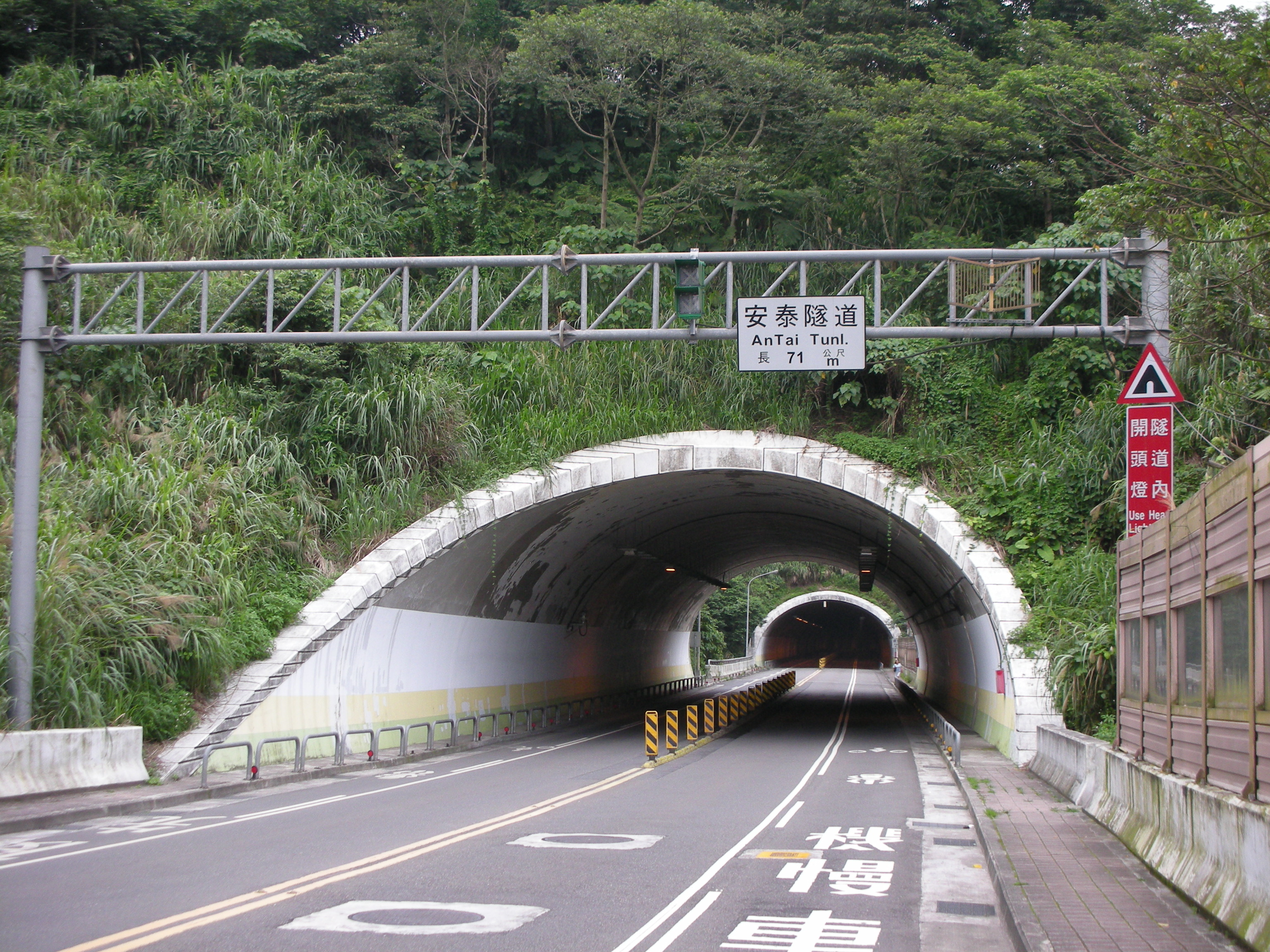 安泰隧道西端入口